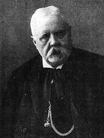 А.С.Шмаков, поверенный гражданского истца на процессе Бейлиса A.S.Shmakov